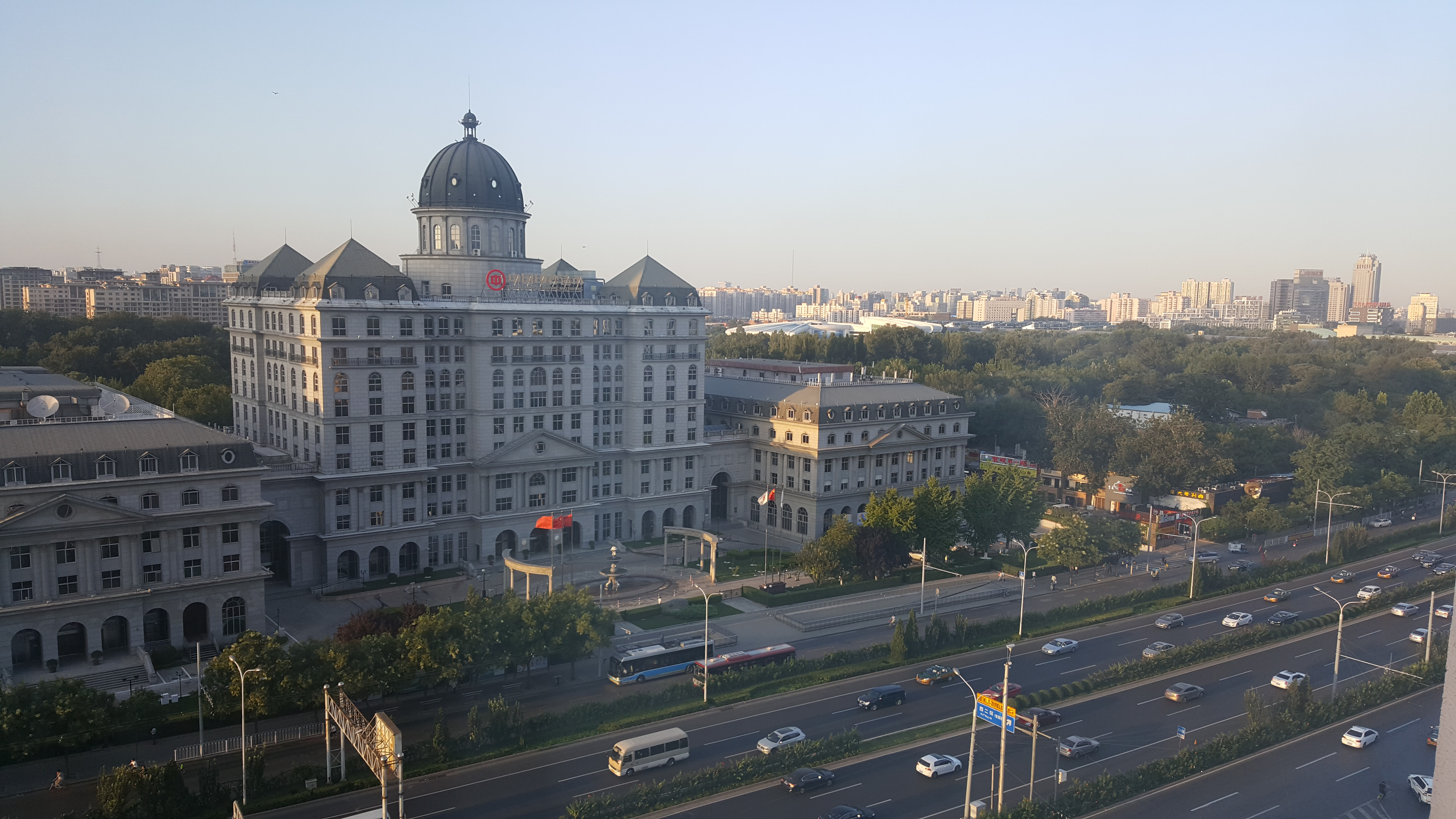 中文（中国大陆）: 从西苑宾馆看西直门外大街